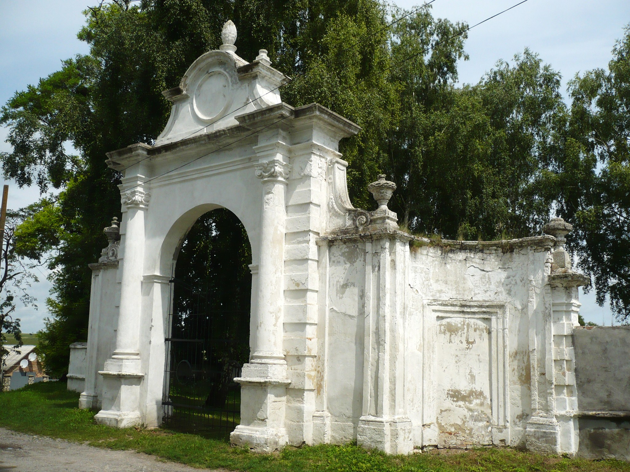 Wiśniowiec, brama do kościoła